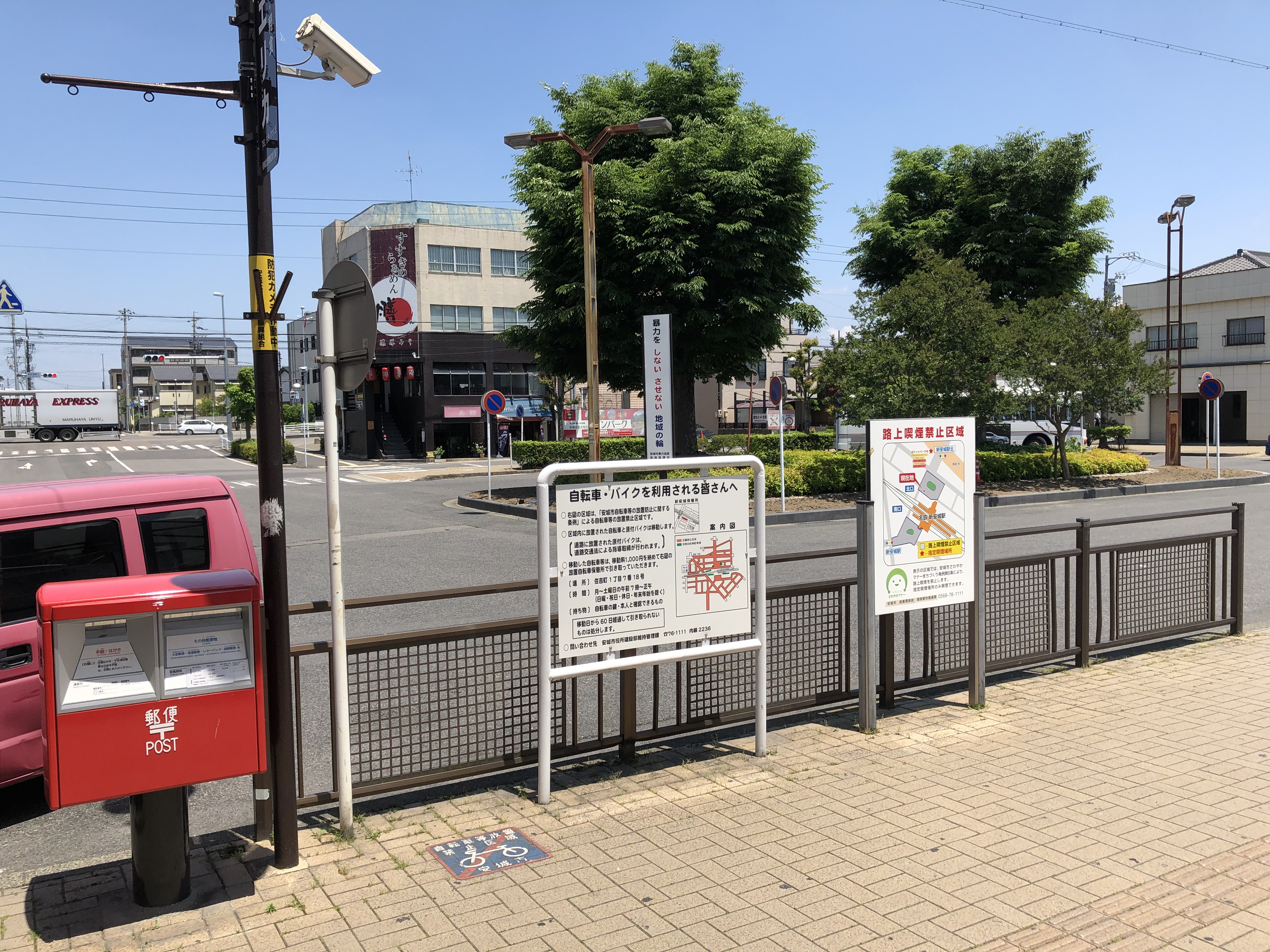 名鉄本線、新安城駅の北口